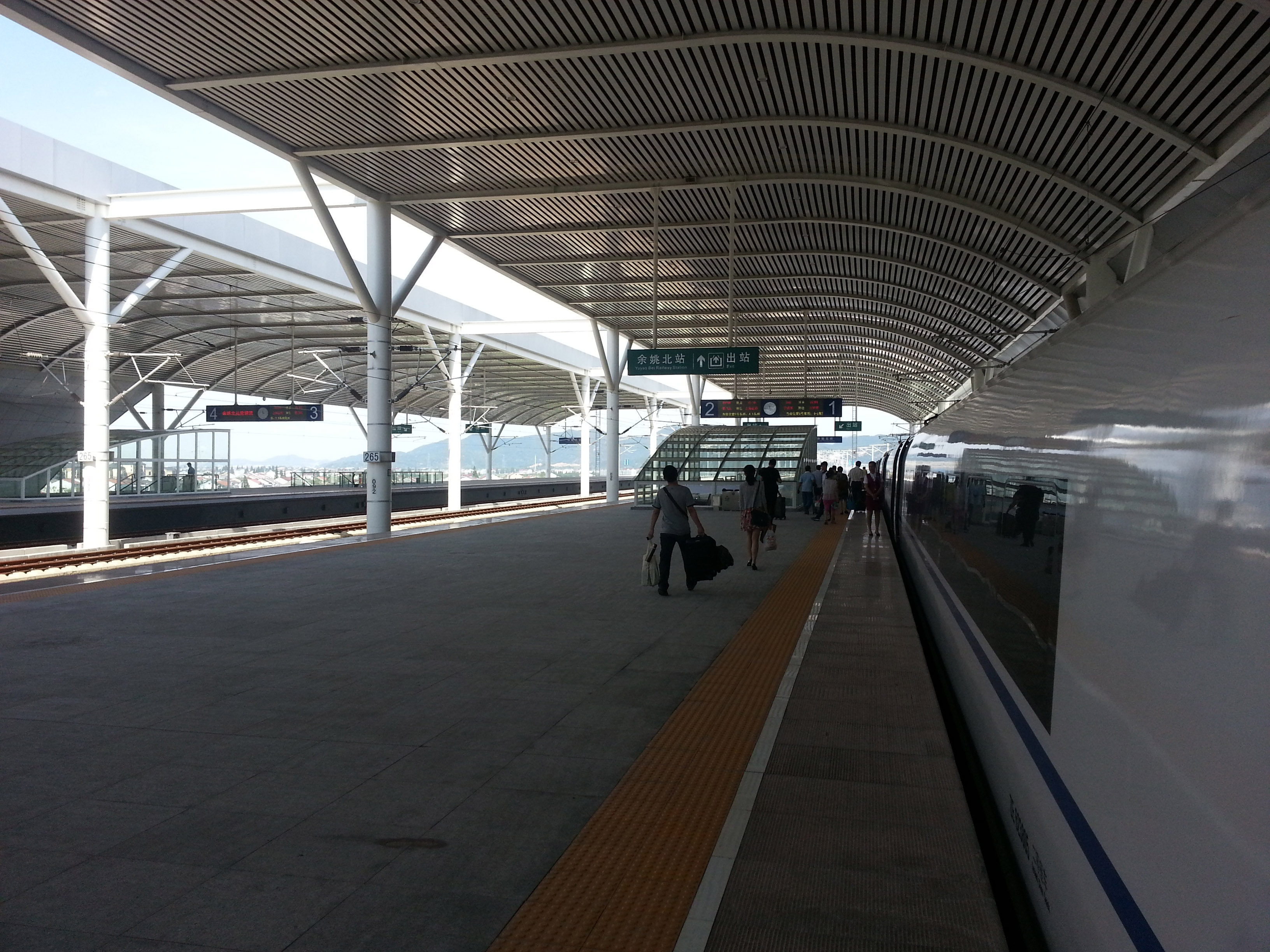 余姚北站站台